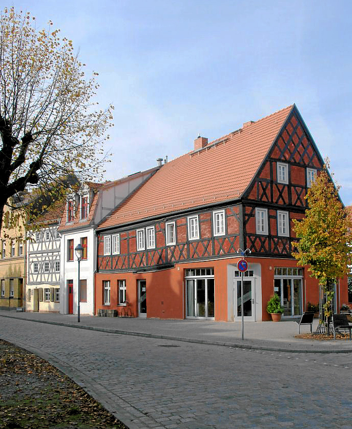 Historischer Stadtkern Treuenbrietzen. Aufgenommen am 10.10.2005 Fotograf: K. Blitz